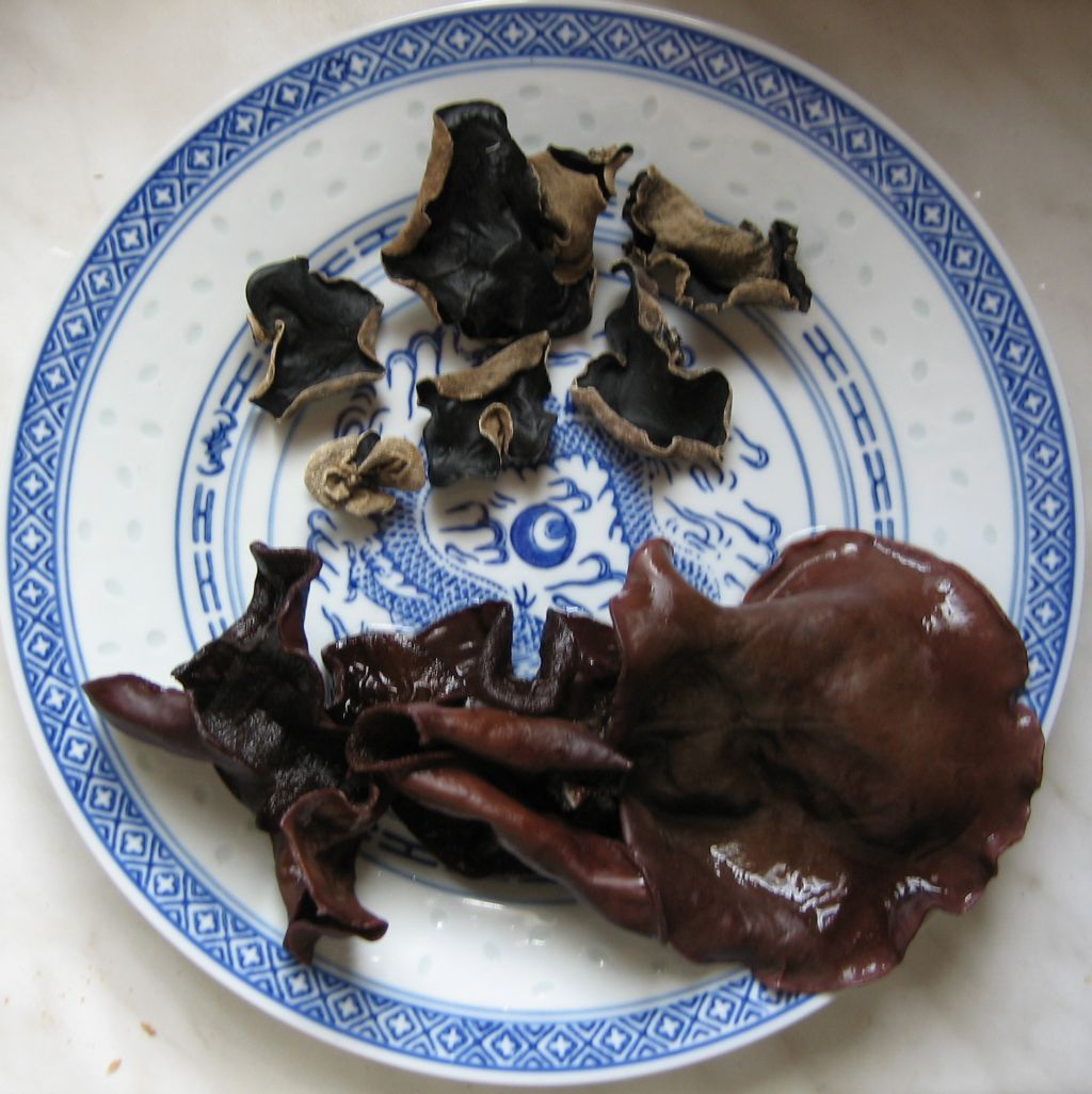 Mu-Err-Pilz (Auricularia auricula-judae) getrocknet und gequollen